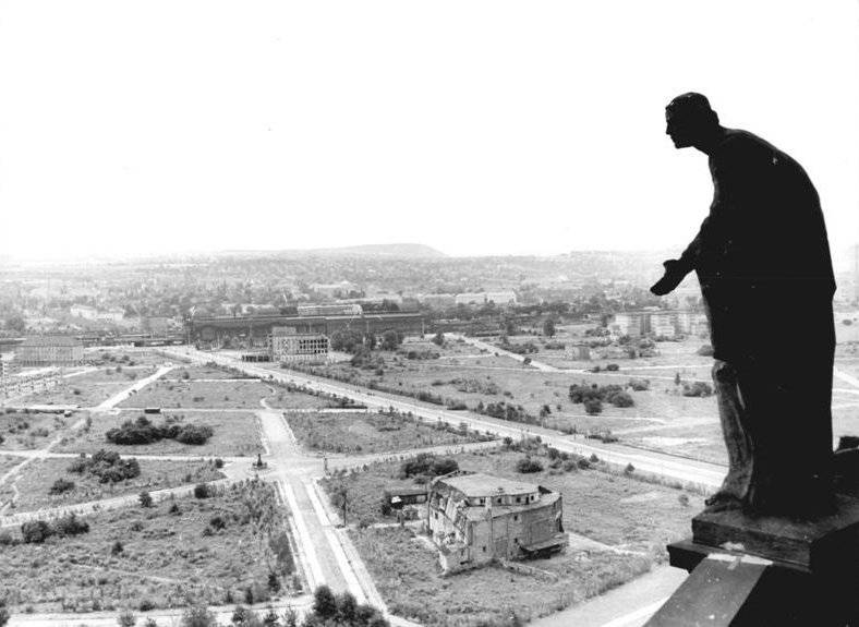 ADN-ZB-Löwe-16.8.79-la-Dresden: 30 Jahre DDR- 1949 - Blick vom Rathausturm: in unermüdlicher Arbeit haben die Dresdner die Trümmerflächen beräumt - das Bild in Richtung Prager Straße gleicht einer großen Wiese. (vergl. dazu die Fotos U 0816-1+11N aus den Jahren 1945 + 1979) [Foto erst etwa 1958 entstanden]